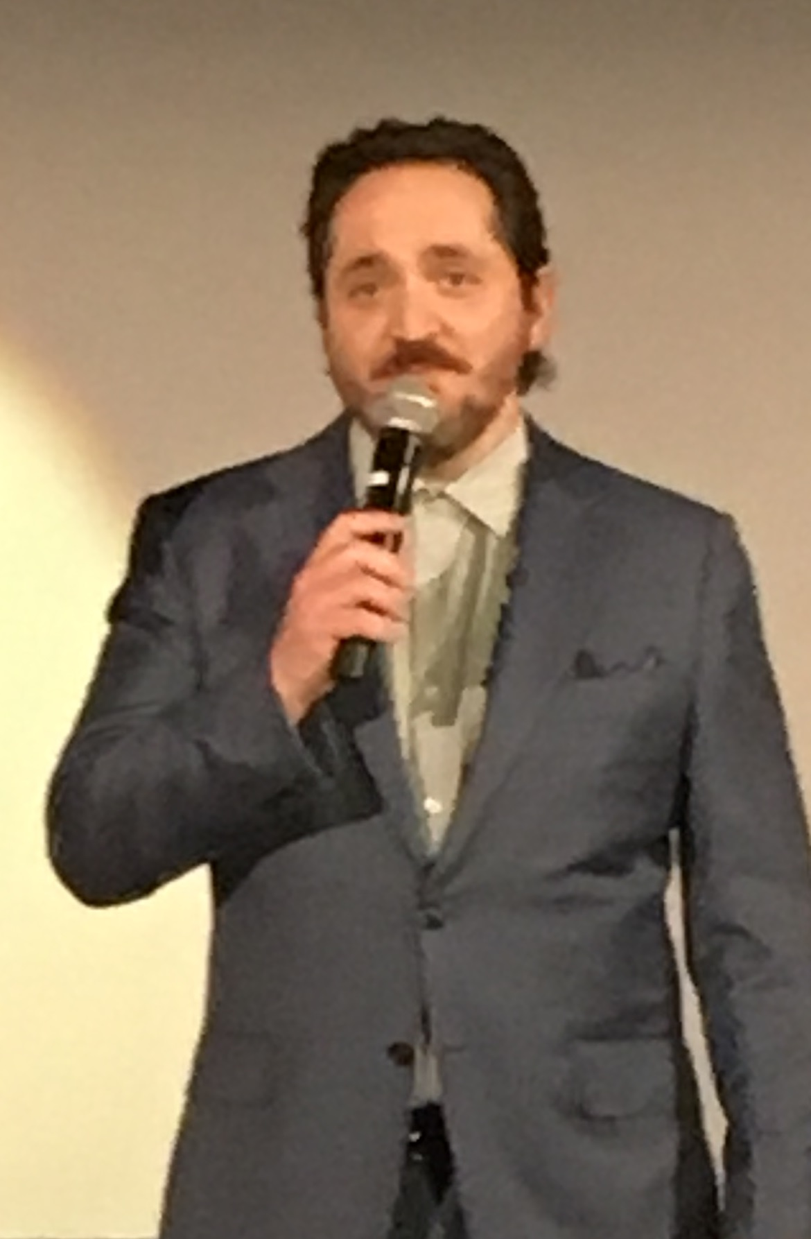 the boss premiere